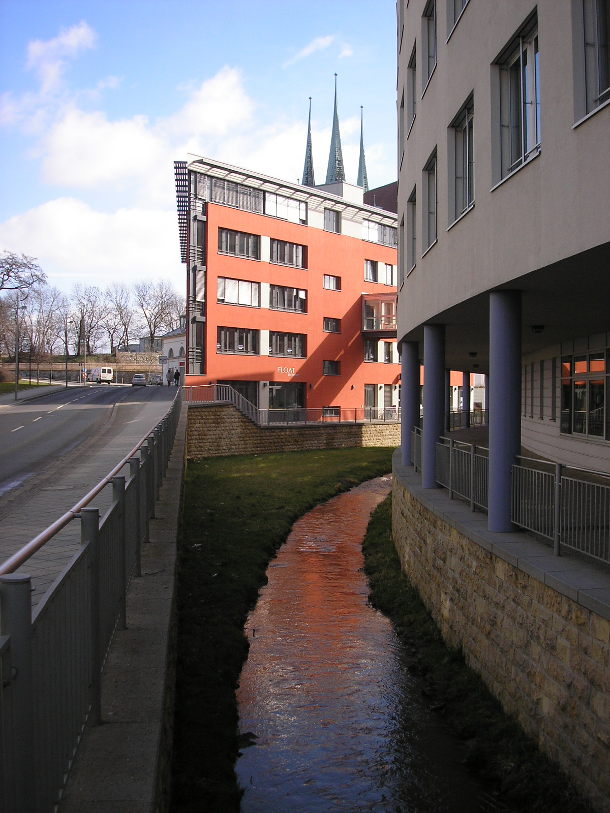 Der Bergstrom der Gera im Brühl in Erfurt (Thüringen).